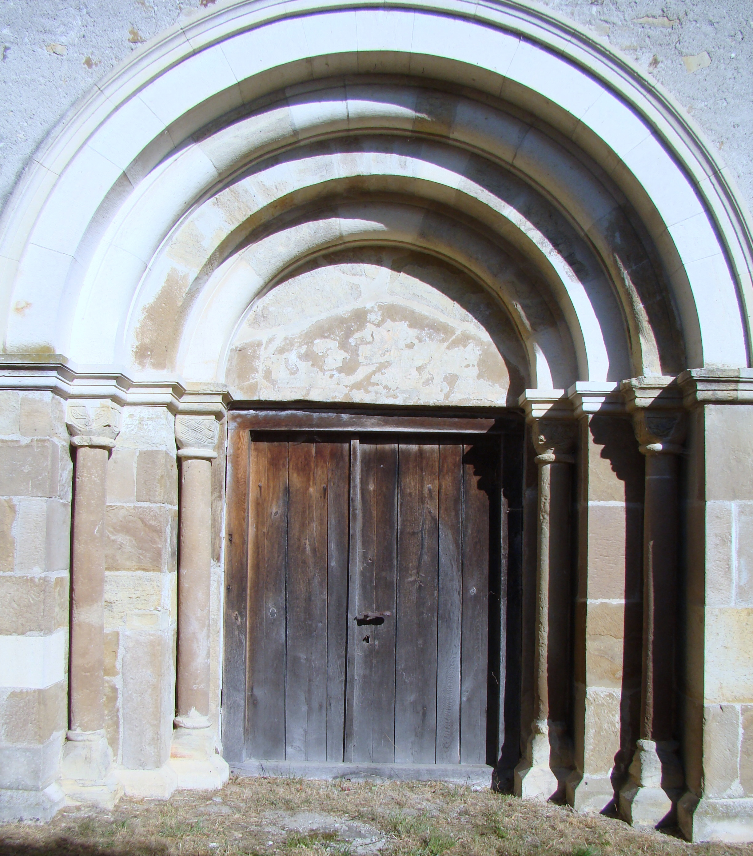 Biserica evanghelică, sat Rodbav; comuna Șoarș 115 sec. XIII-XIX